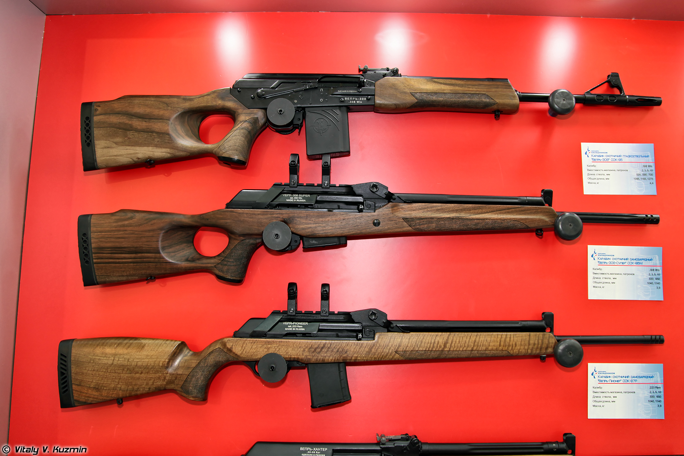 Карабины .308 Win Вепрь-308 СОК-95, Вепрь-308-Супер СОК-95М и .223 Rem Вепрь-Пионер СОК-97Р (.308 Win Vepr-308 SOK-95, Vepr-308-Super SOK-95M and .223 Rem Vepr-Pioner SOK-97R)